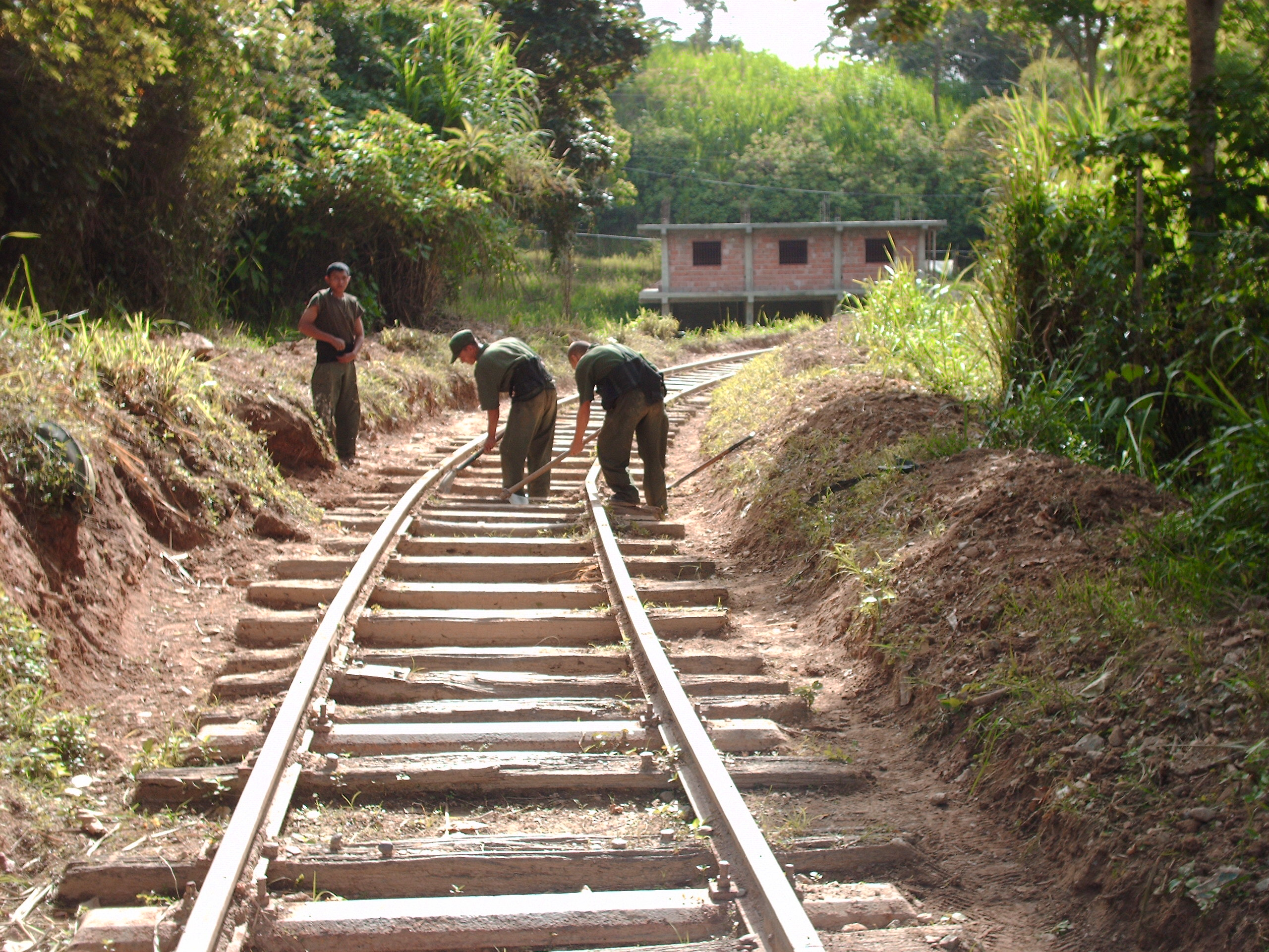 Recuperacion de la via Ferrea en el Parque El Encanto